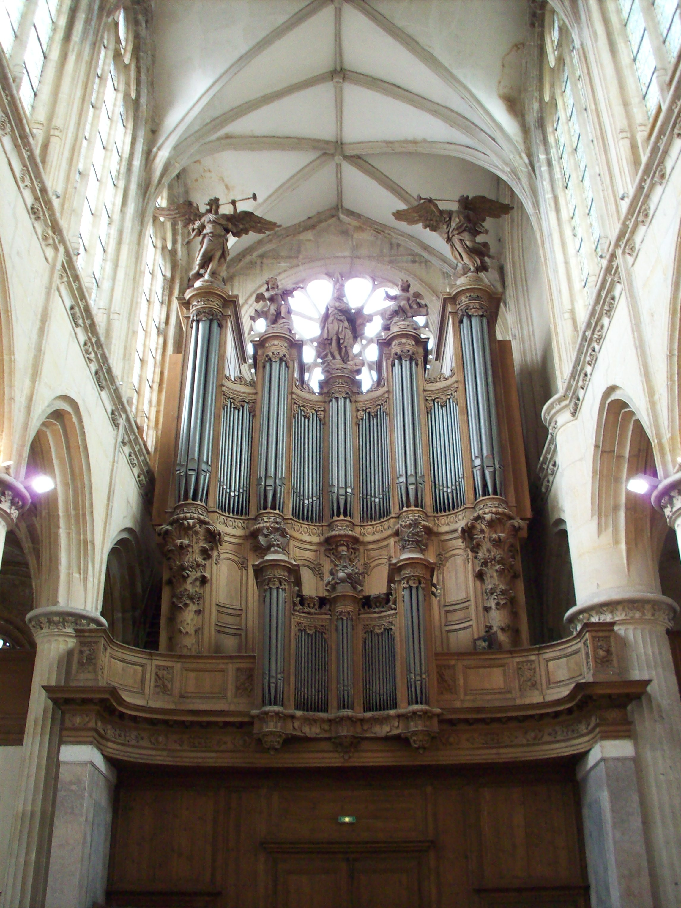 Orgue du Temple Protestant, ancienne église Saint-Eloi, de Rouen : buffet de 1731 érigé et sculpté par Gibon, Paillet et Rollet, sur un dessin attribué à Vernisse pour un orgue de Charles et Jean-Baptiste-Nicolas LEFEBVRE de 1734, totalement reconstruit en 1979 par Haerpfer-Erman sous la direction de Théo Haerpfer et harmonisé par Joseph Bastien. Il est réharmonisé par Jean-François Dupont en 1990.